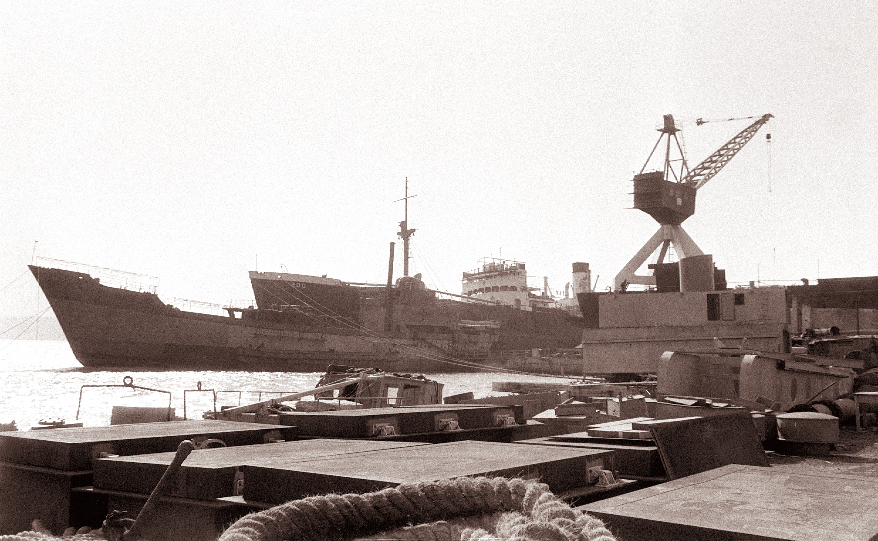 Piranska ladjedelnica